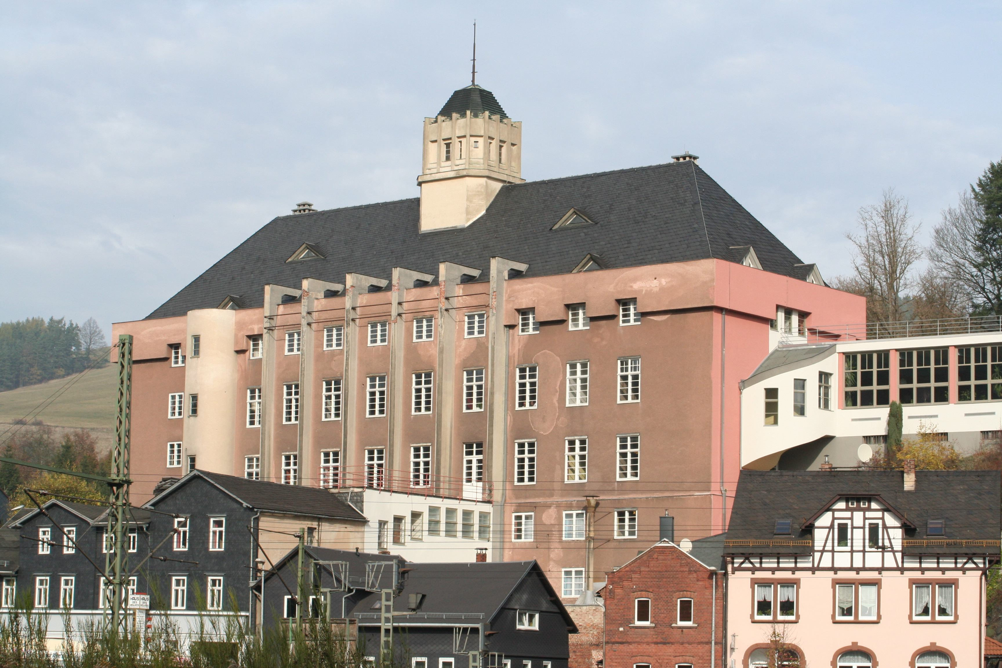 Haus des Volkes Probstzella in Südthüringen